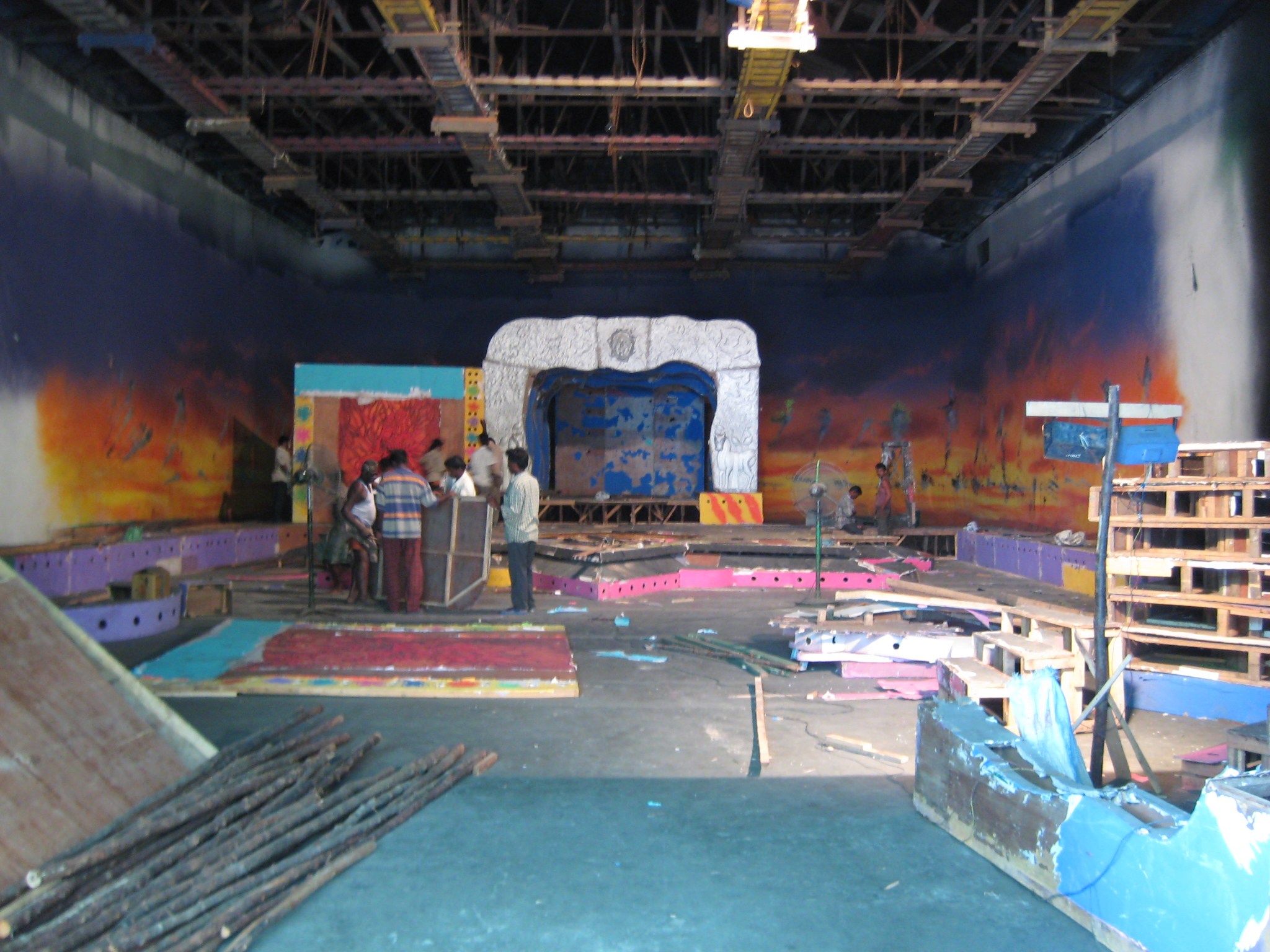 Chennai est la capitale du cinéma Tamoul. C'est un peu Bollywood, mais en plus local et avec beaucoup moins de budget!